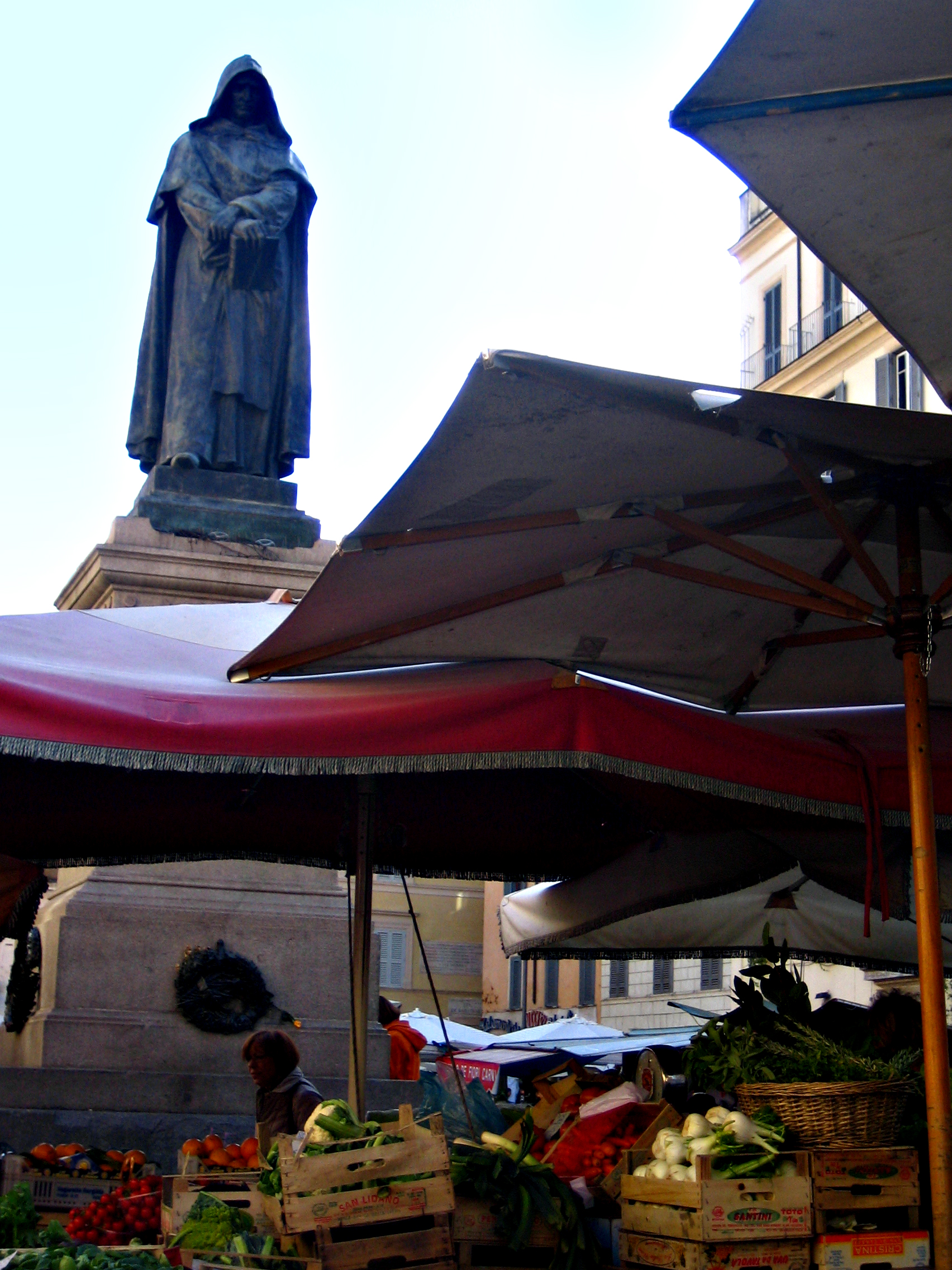 Campo de Fiori, Roma, Italia